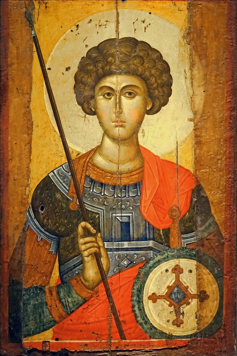 Icône de Saint Georges Constantinople Atelier de peinture d'icône 14ème siècle Site du musée byzantin et chrétien